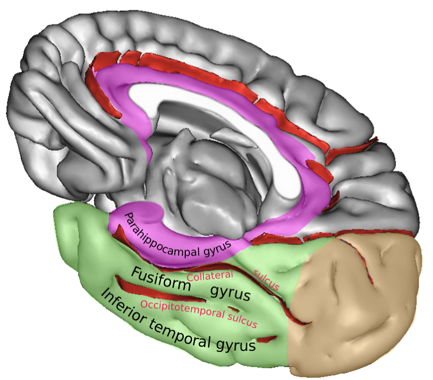 Temporal lobe, gyri and sulci.